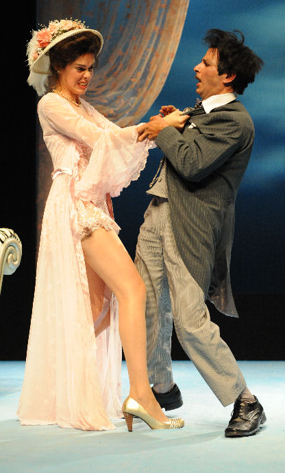 יוסי עיני ונילי רוגל בהצגה בעלי המתוק אשתי היקרה